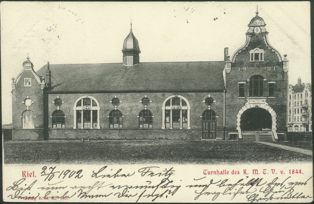 Turnhalle des Kieler Männer-Turnvereins (K.M.T.V.) von 1844 in der Jahnstraße